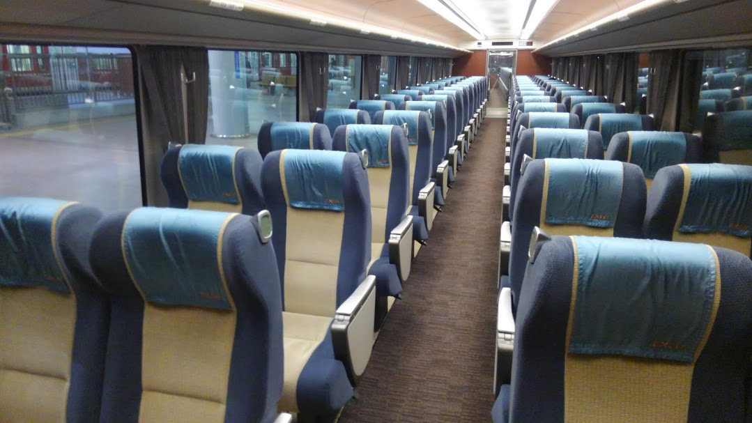 小田急30000形の車内